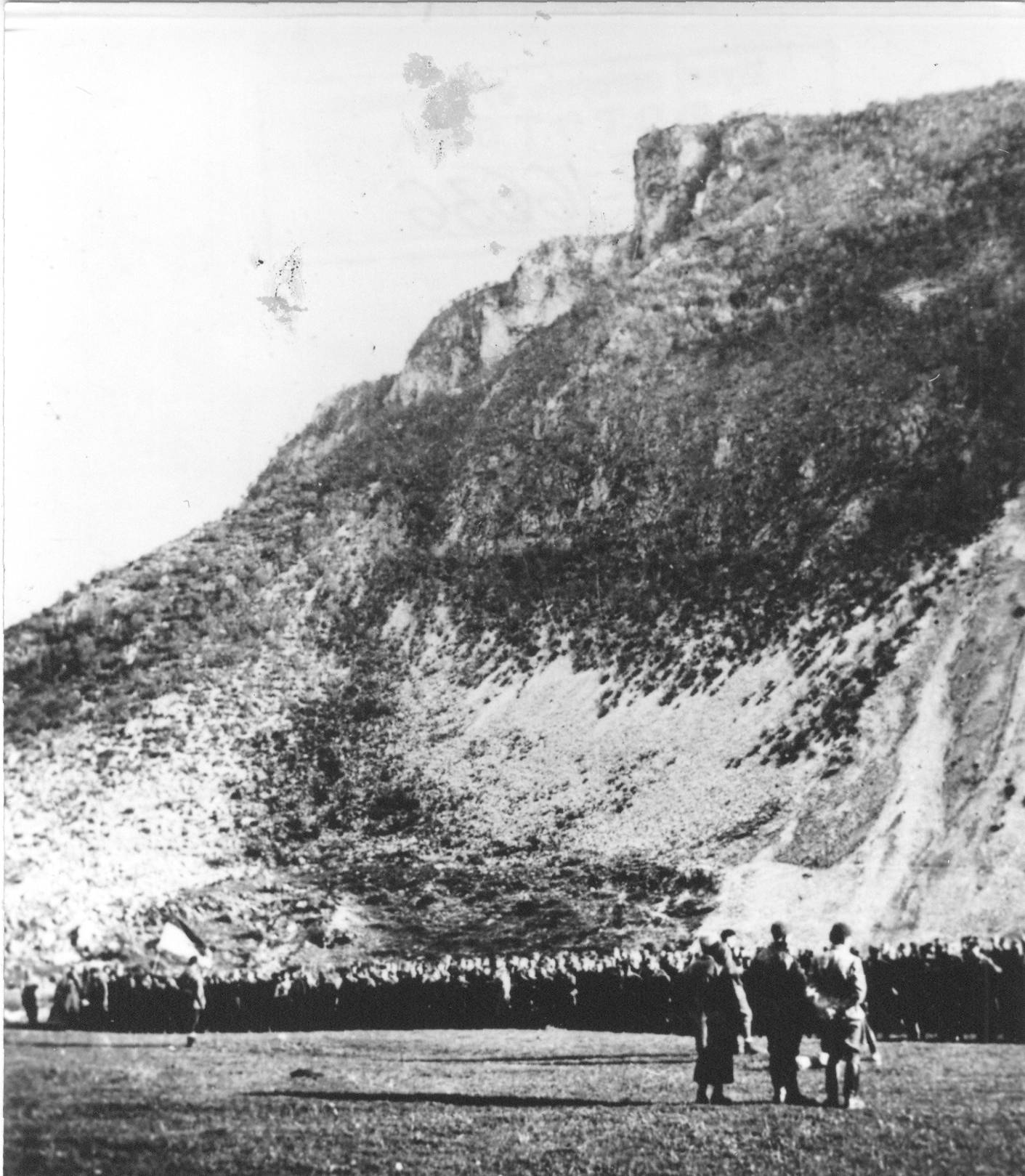 Srpskohrvatski / српскохрватски: Smotra boraca 2. proleterske divizije u Boanu neposredno uoči bitke na Sutjesci, maja 1943. godine. Pred strojem jedinica je komandant divizije Peko Dapčević.